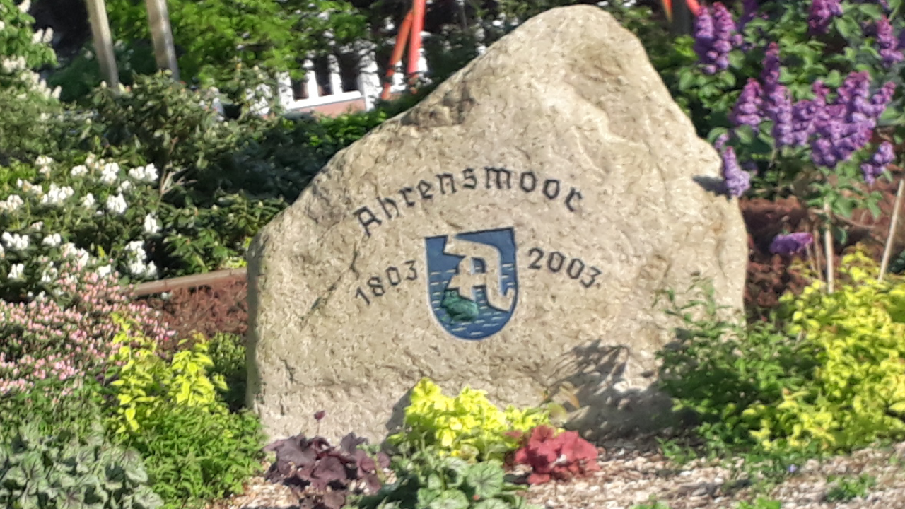 Gedenkstein in Ahrensmoor, Landkreis Stade.